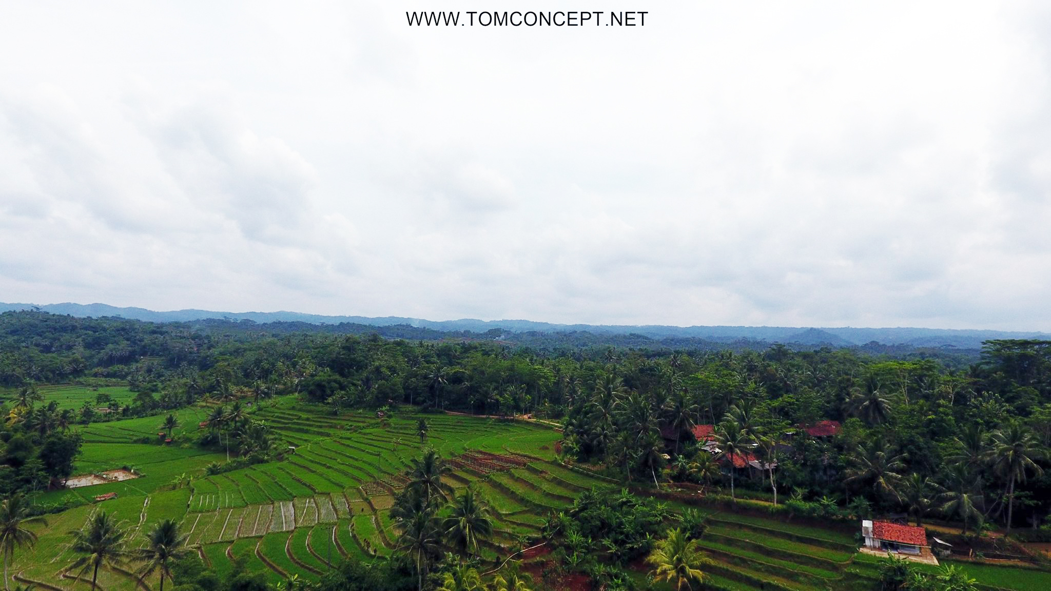 Sawah di sukadana